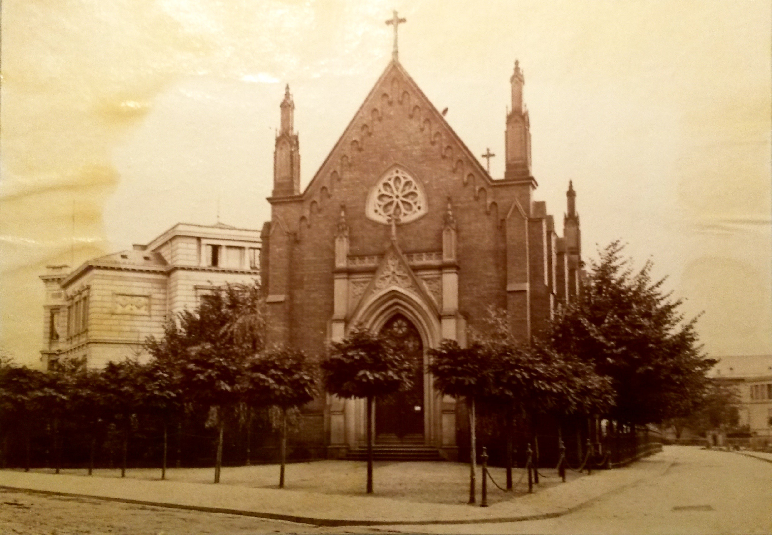 Foto eines unbekannten Fotografen, das die Kirche noch vor der Erweiterung und dem Anbau des Turms 1887/88 zeigt, aus einem Fotoalbum eines englischen Kurgasts in Wiesbaden, vor 1887, Privatsammlung Wiesbaden.